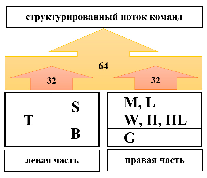 Структура команды мультипроцессора ПС-2000